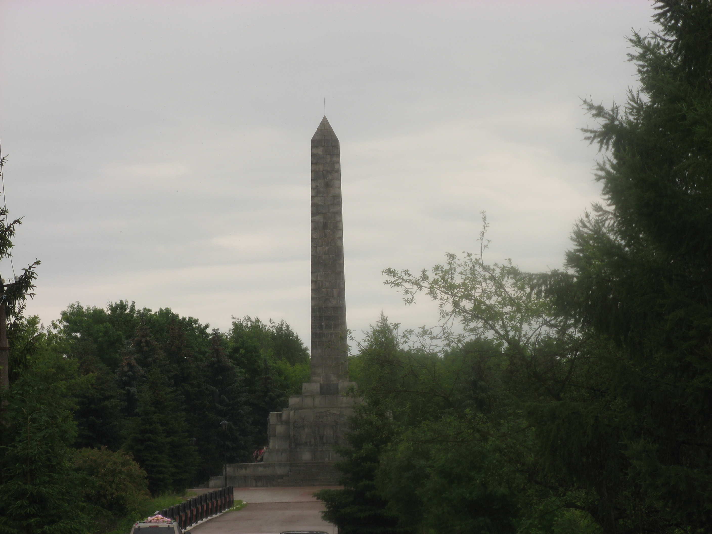 Обелиск в Ржеве